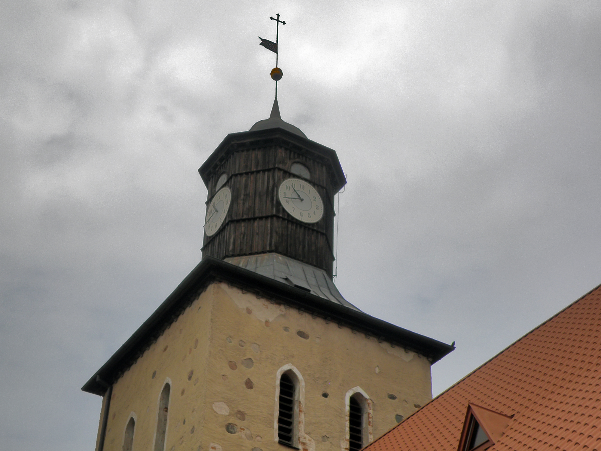 Polska, Pisz - Rzymskokatolicki Kościół Parafialny św. Jana Chrzciciela. Zabytek wpisany pod nr A-472 do rejestru zabytków województwa warmińsko-mazurskiego. This photo of Warmian-Masurian Voivodeship was taken during Wikiexpedition 2012 set up by Wikimedia Polska Association.You can see all photographs in category Wikiekspedycja 2012. The making of this document was supported by Wikimedia Polska.